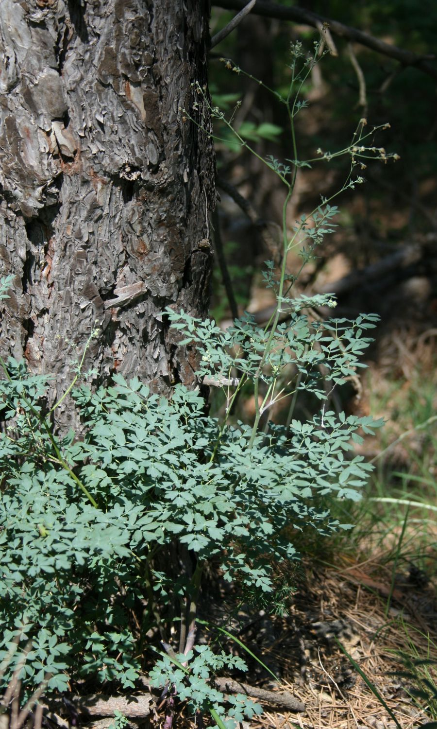 Kleine Wiesenraute (Thalictrum minus subsp. majus, = subsp. pseudominus), Hahnenfußgewächse (Ranunculaceae) - Ungarn/Magyarország/Hungary: Pest megye, Szénás-Hügel bei Pilisszentiván